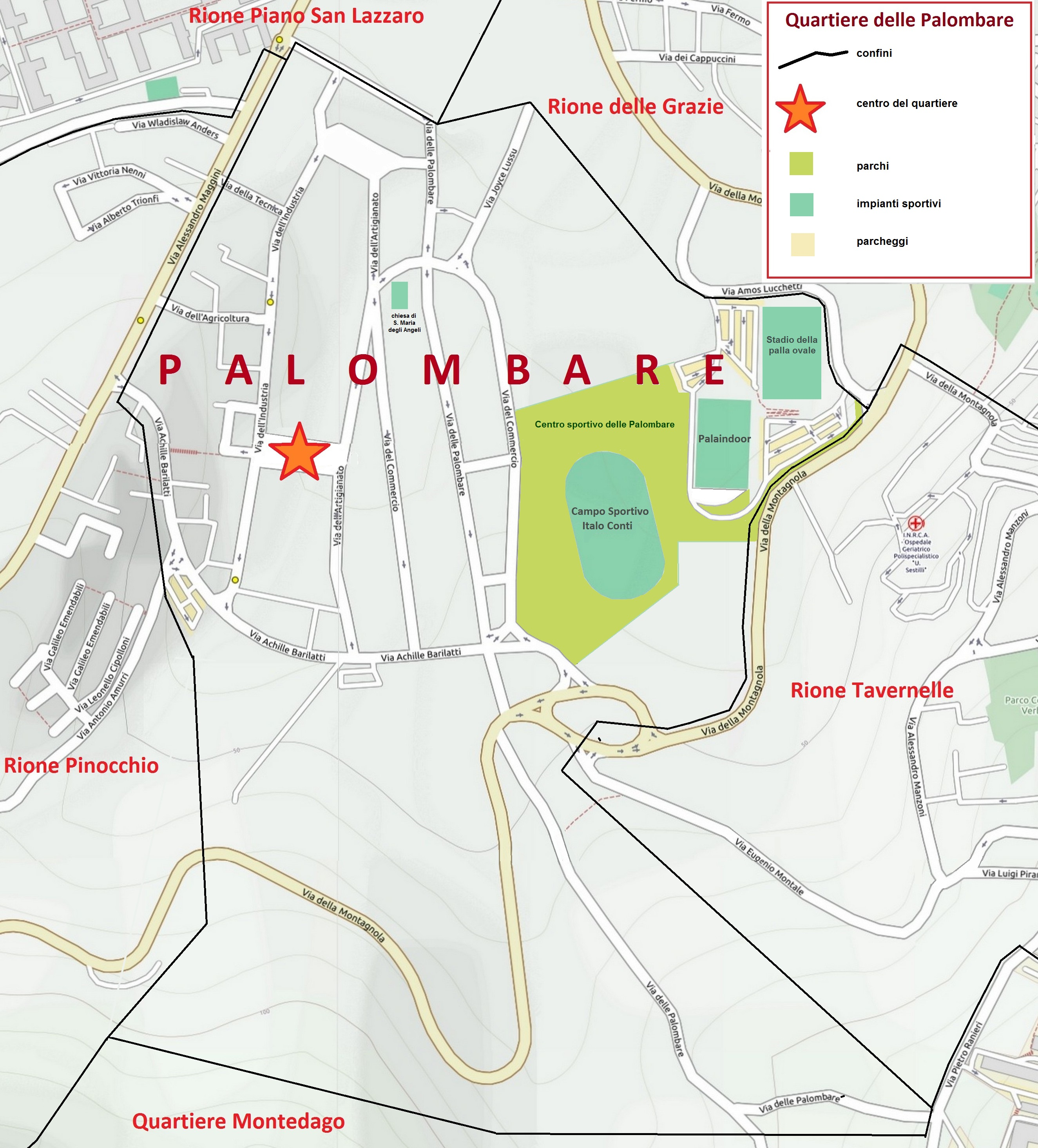 Mappa del quartiere delle Palombare di Ancona, con i confini, le vie, le piazze e i parchi.